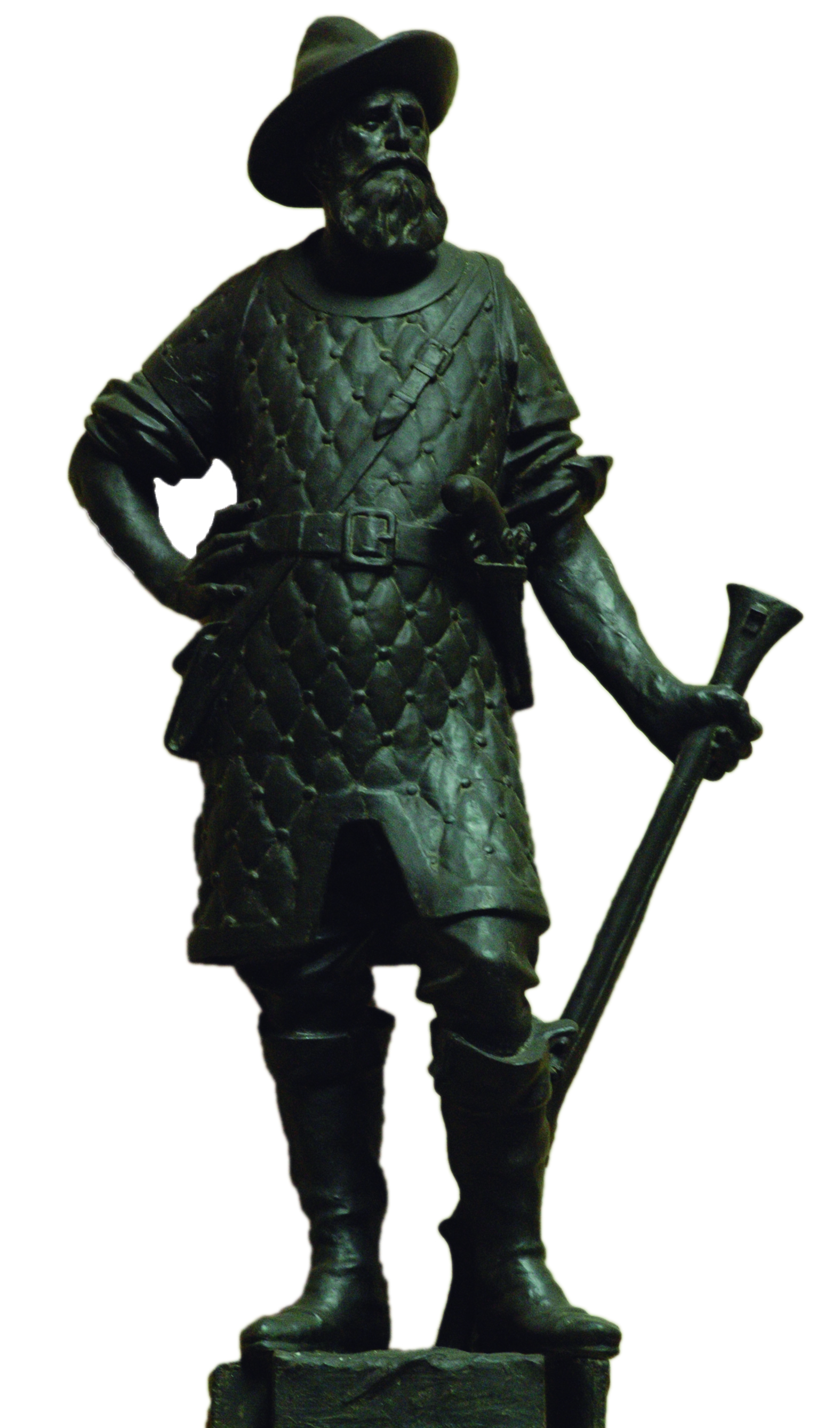 Estátua em bronze do bandeirante Manoel Preto, no Museu Paulista em São Paulo, 1922.